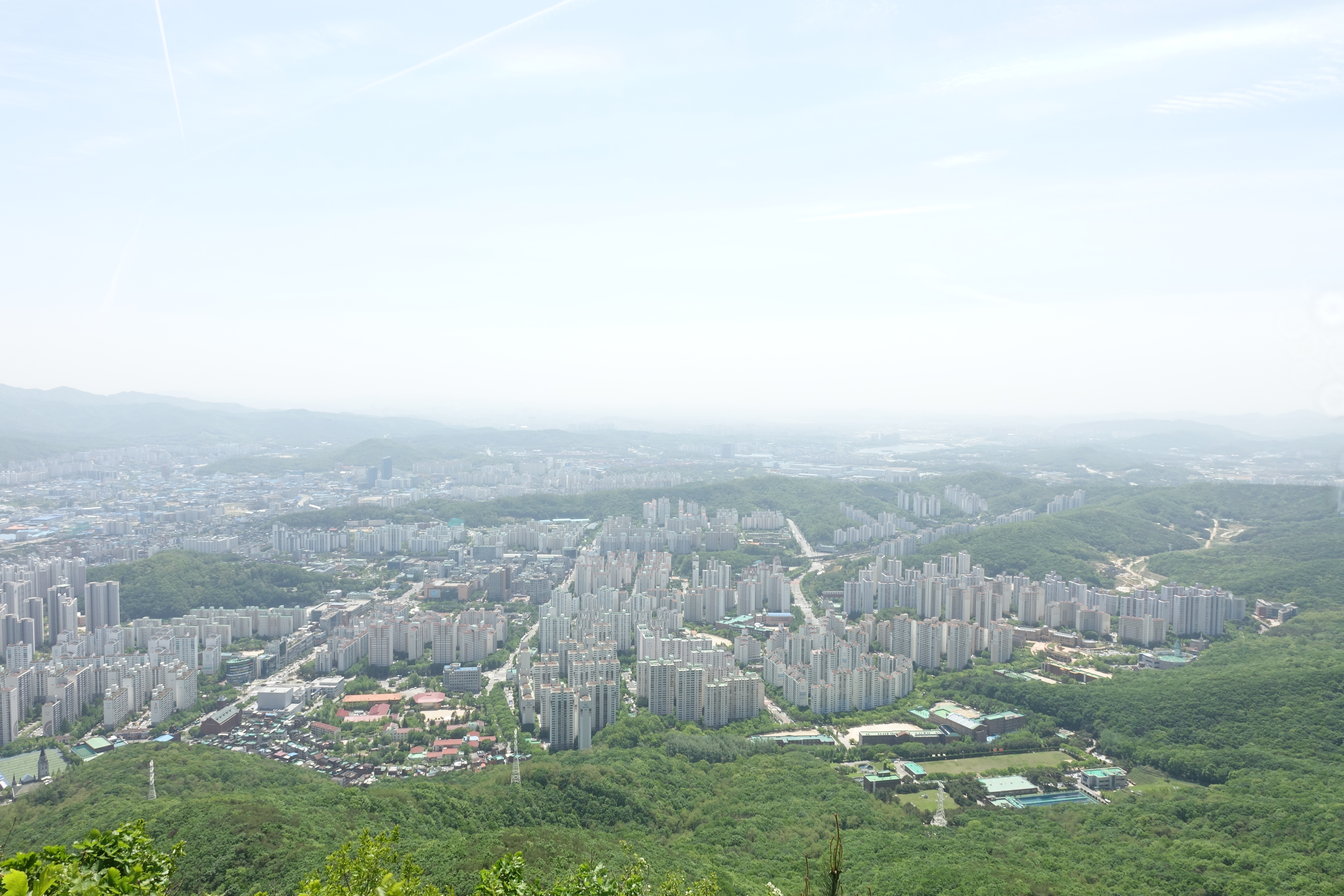 최광모 촬영 사진 (Photos taken by Choe Kwangmo)